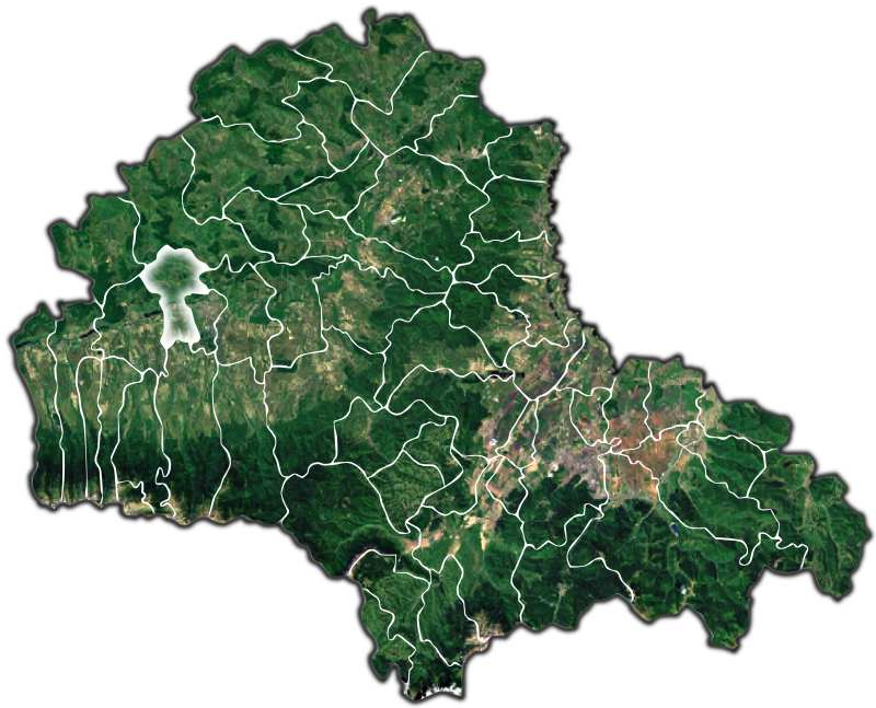 Beclean jud Brasov